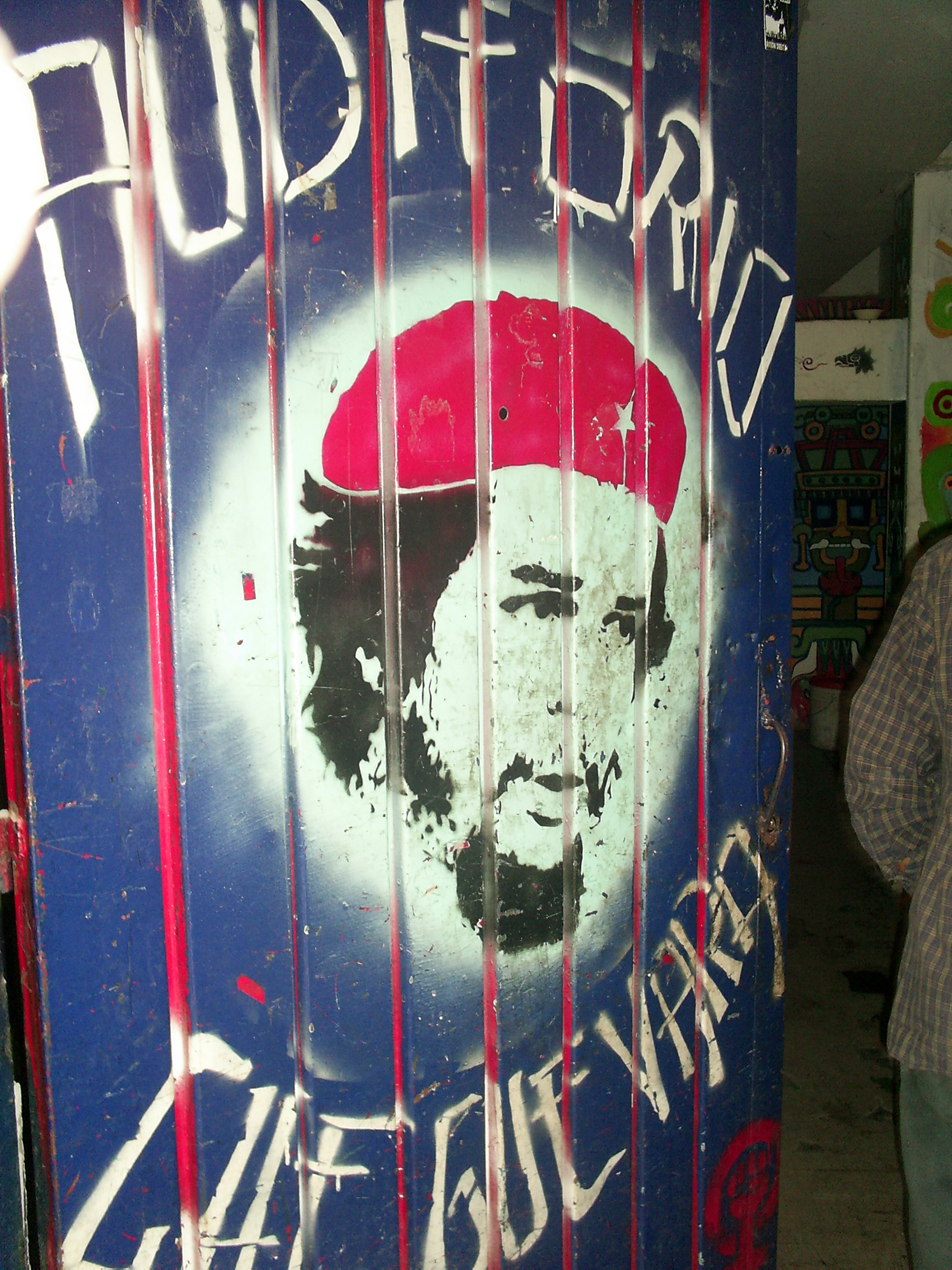 Foto de una de las puertas del Auditorio Ernesto "Che" Guevara de la UNAM.